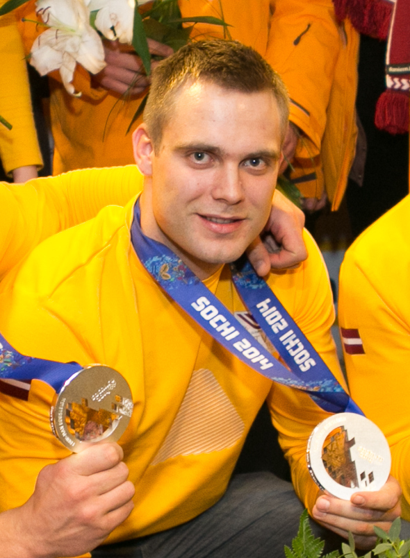 Latvijas Olimpiskās komandas sagaidīšana lidostā "Rīga"